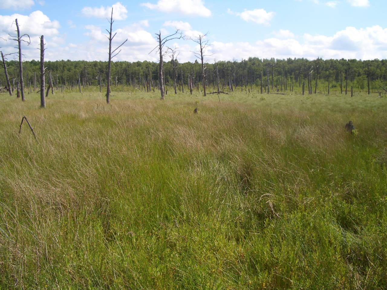 Hochmoorbereich im Naturschutzgebiet Kieshofer Moor.